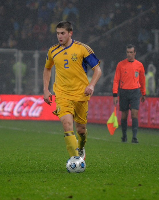 Ярослав Ракицкий в матче Украина - Греция